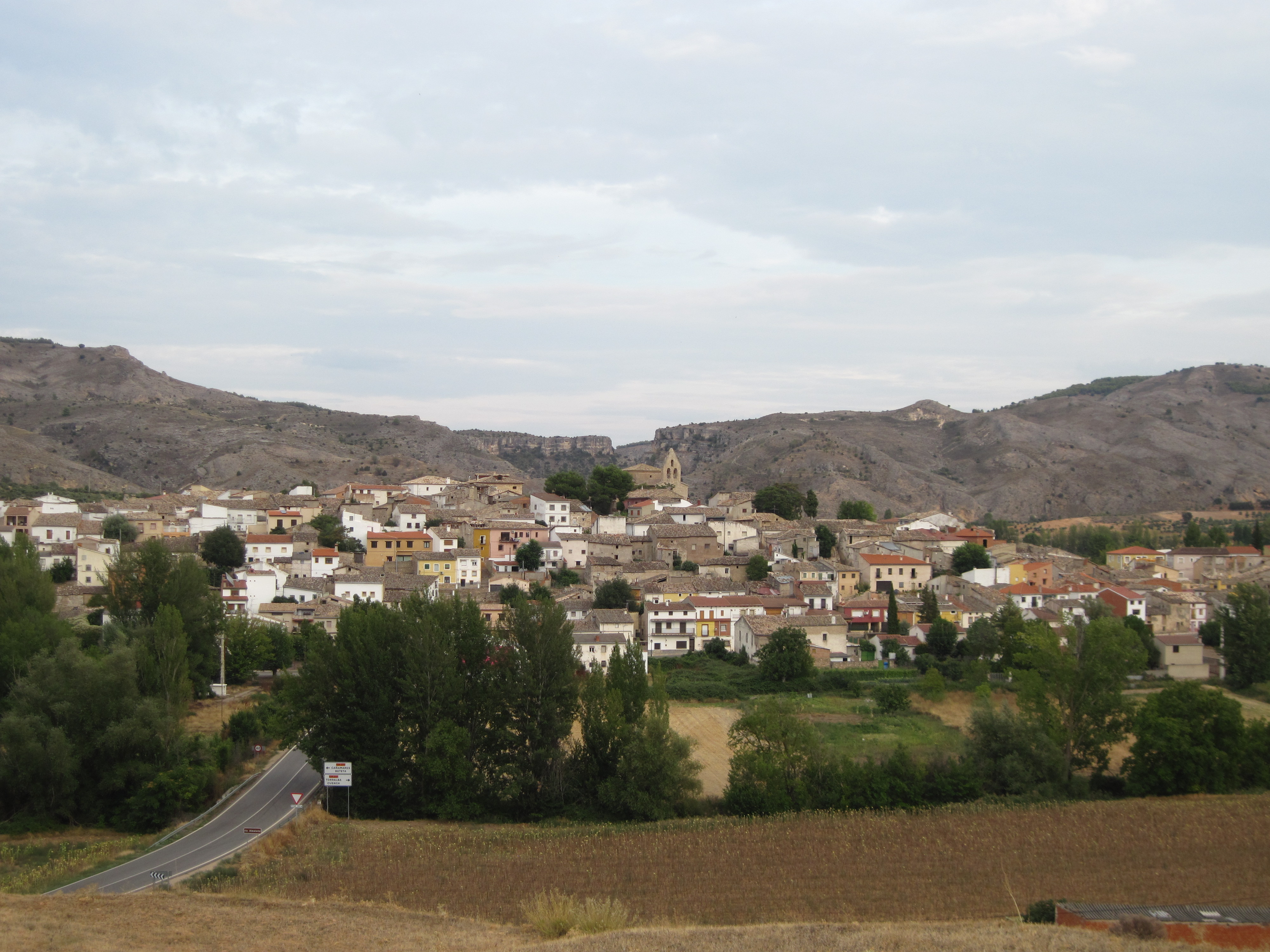 Vista desde las Eras de las Nieves